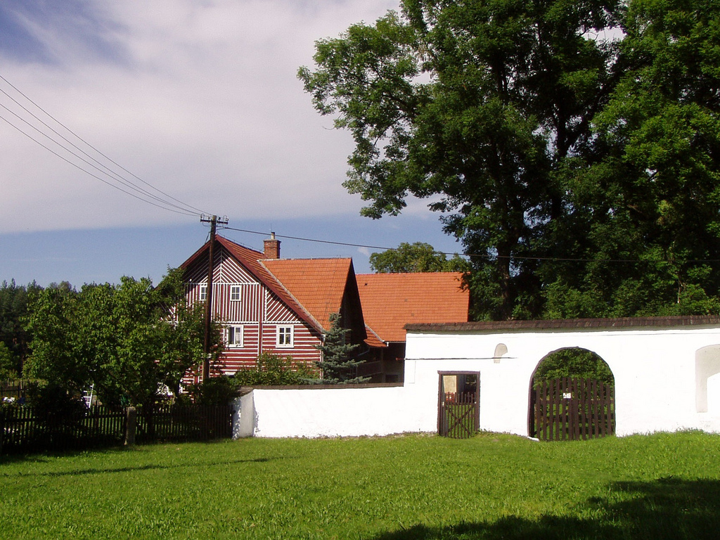 Vlastibořice - Sedlíšťka - statek čp. 9